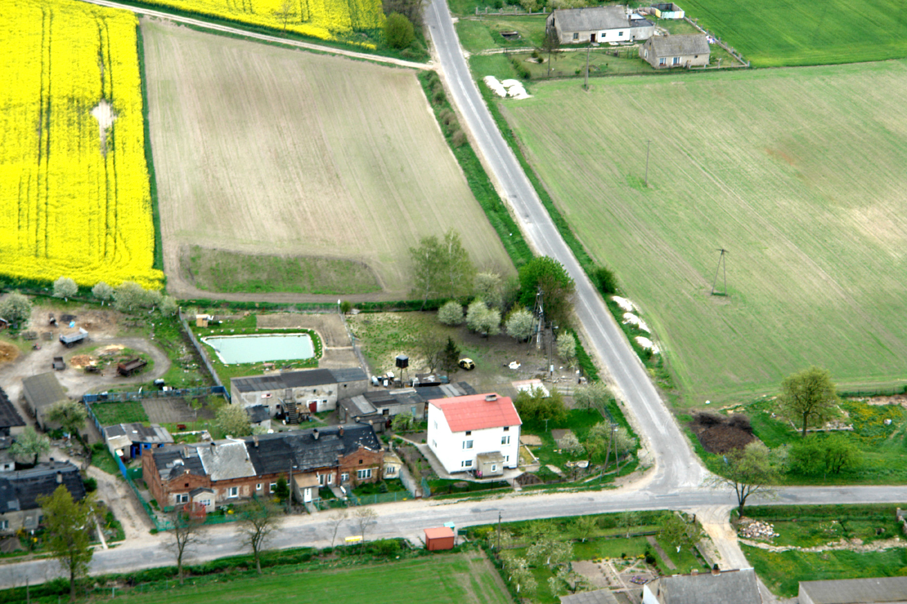 Widok Wsi Witowy z lotu ptaka (zdjęcie lotnicze).